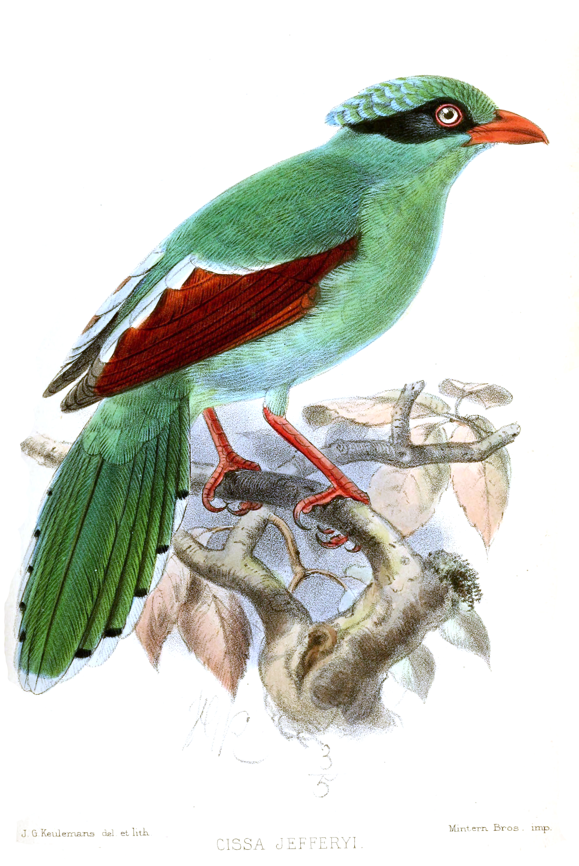 Cissa jefferyi